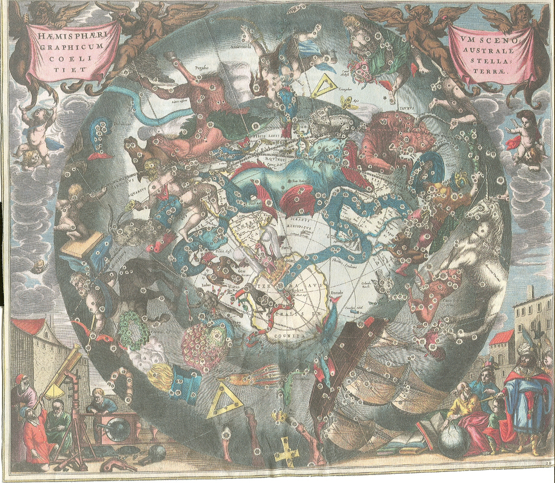 Tekening in de in 1646 gepubliceerde atlas van Andreas Cellarius (Neuhausen, circa 1595 – Hoorn, 1665) De tekenaar is hoogstwaarschijnlijk al meer dan 70 jaar dood.